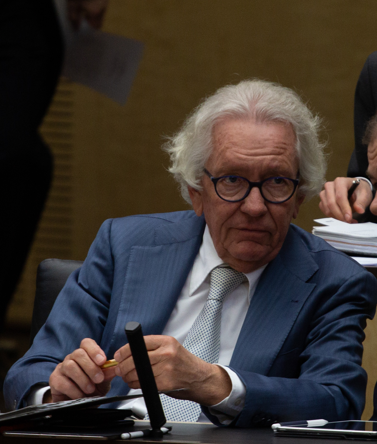 Plenarsitzung des Bundesrates am 12. April 2019 in Berlin.